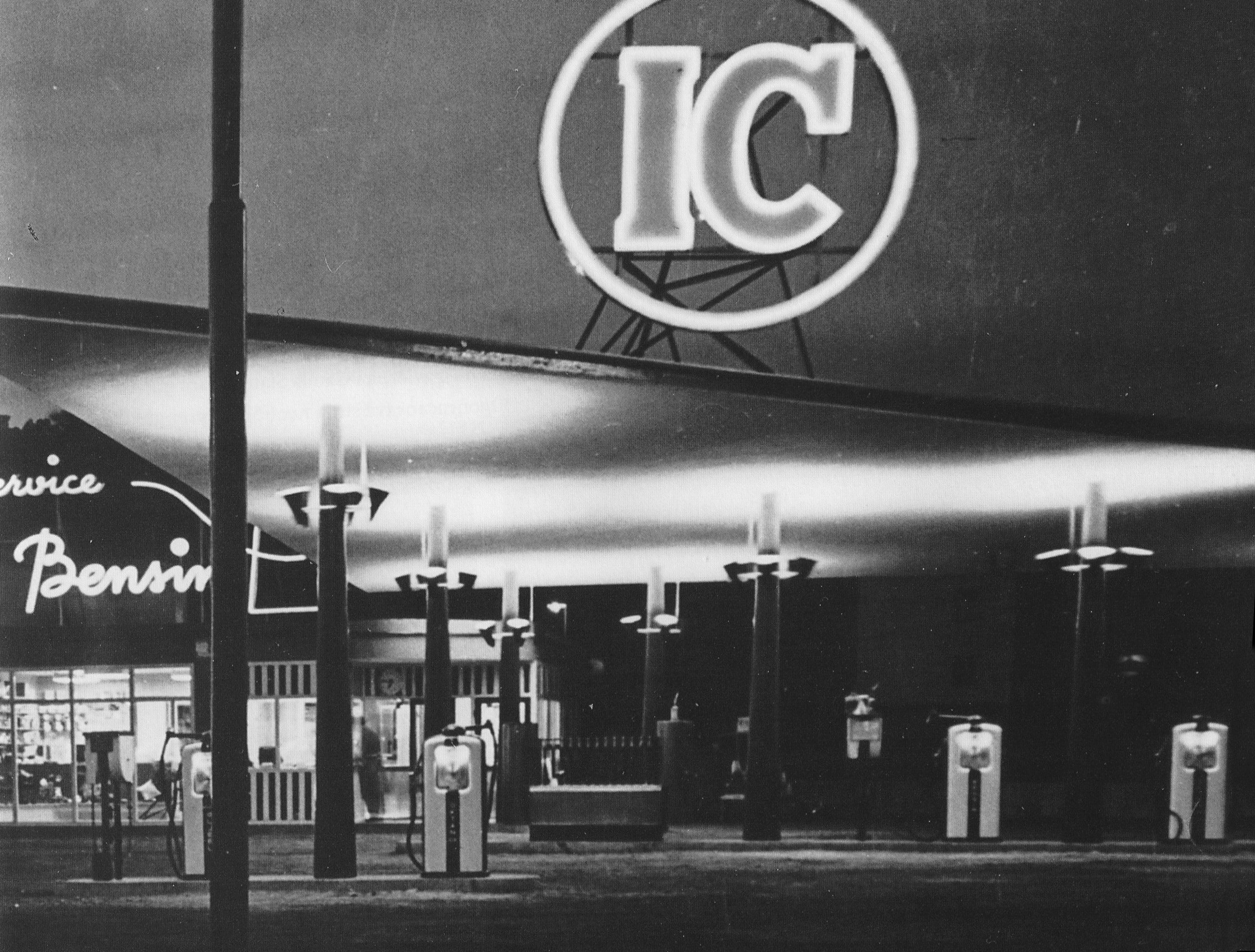 IC bensinstation vid Brommaplan med belysning och neonreklam av Morneon